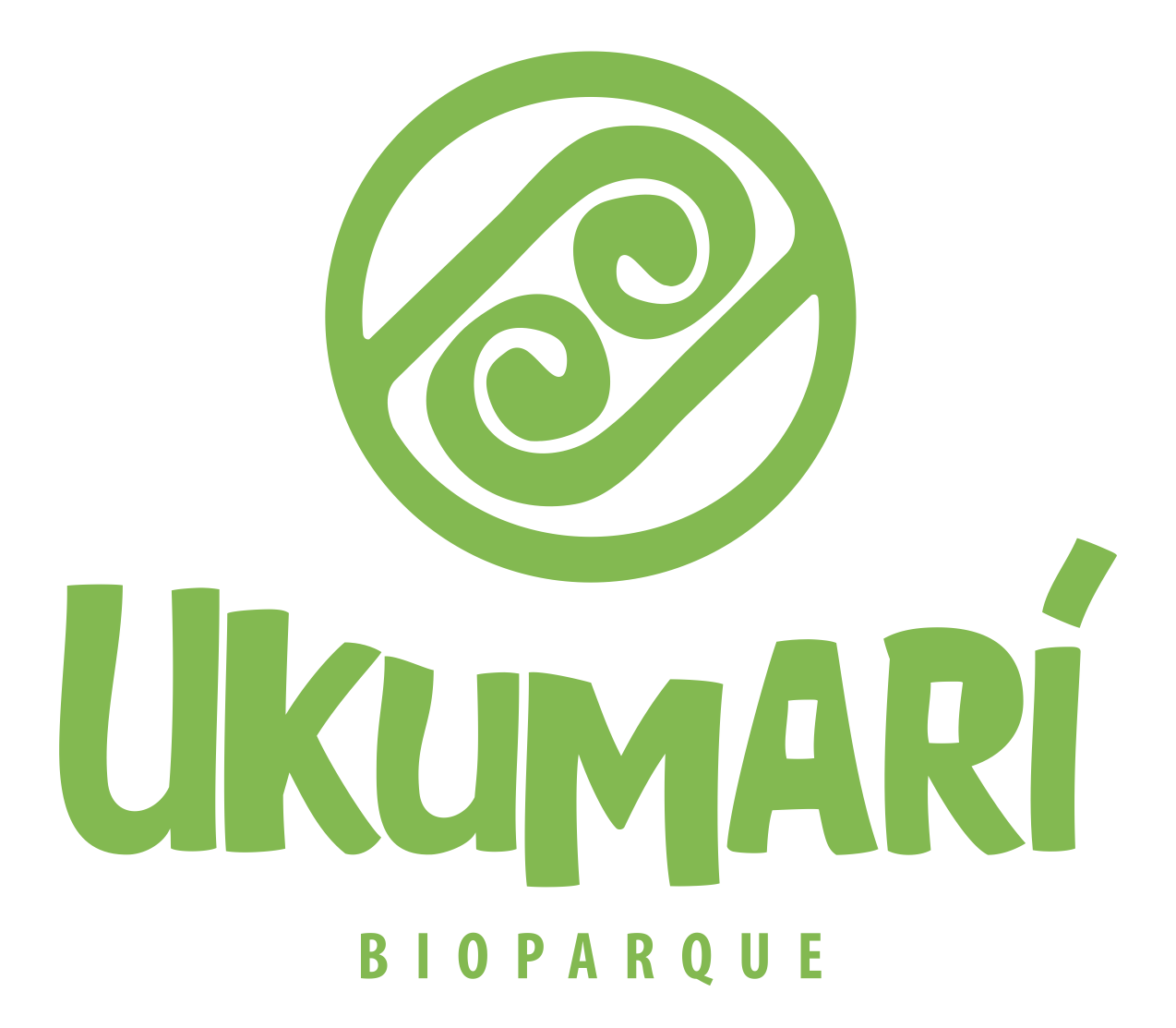 Logotipo Bioparque Ukumarí